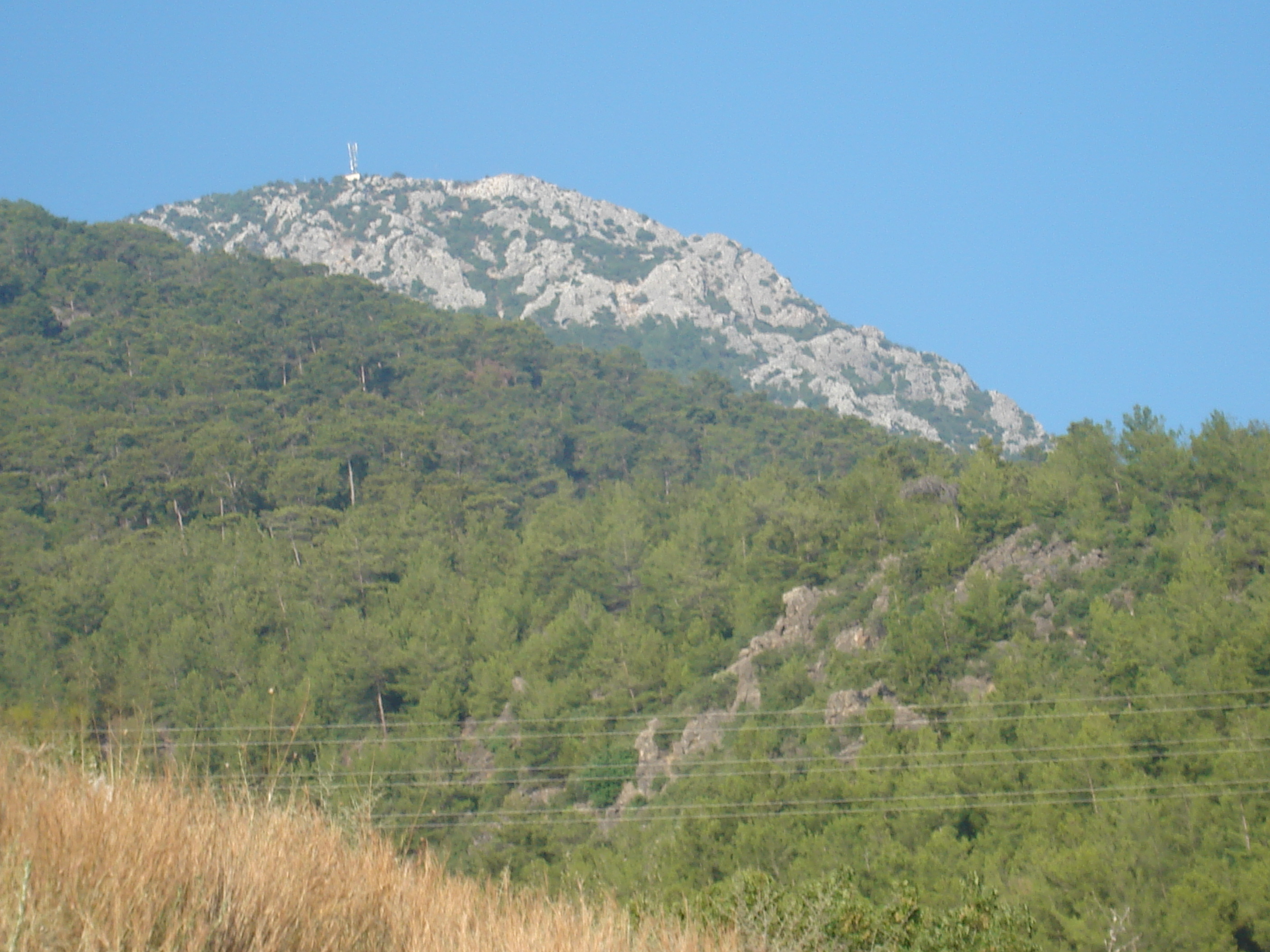 mustafa tut